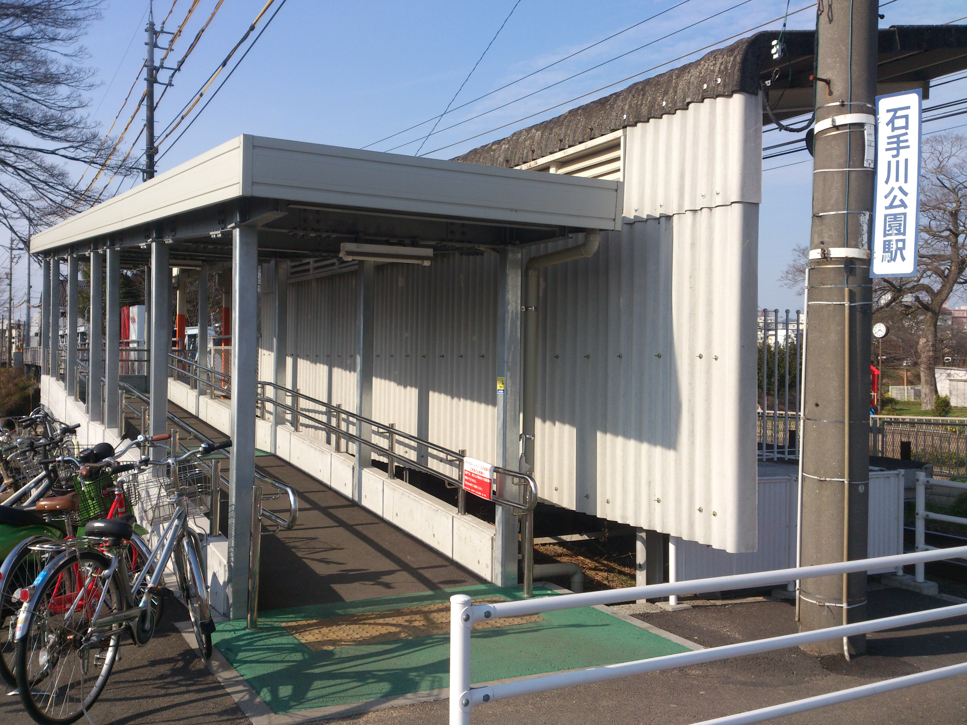 伊予鉄道 石手川公園駅です。